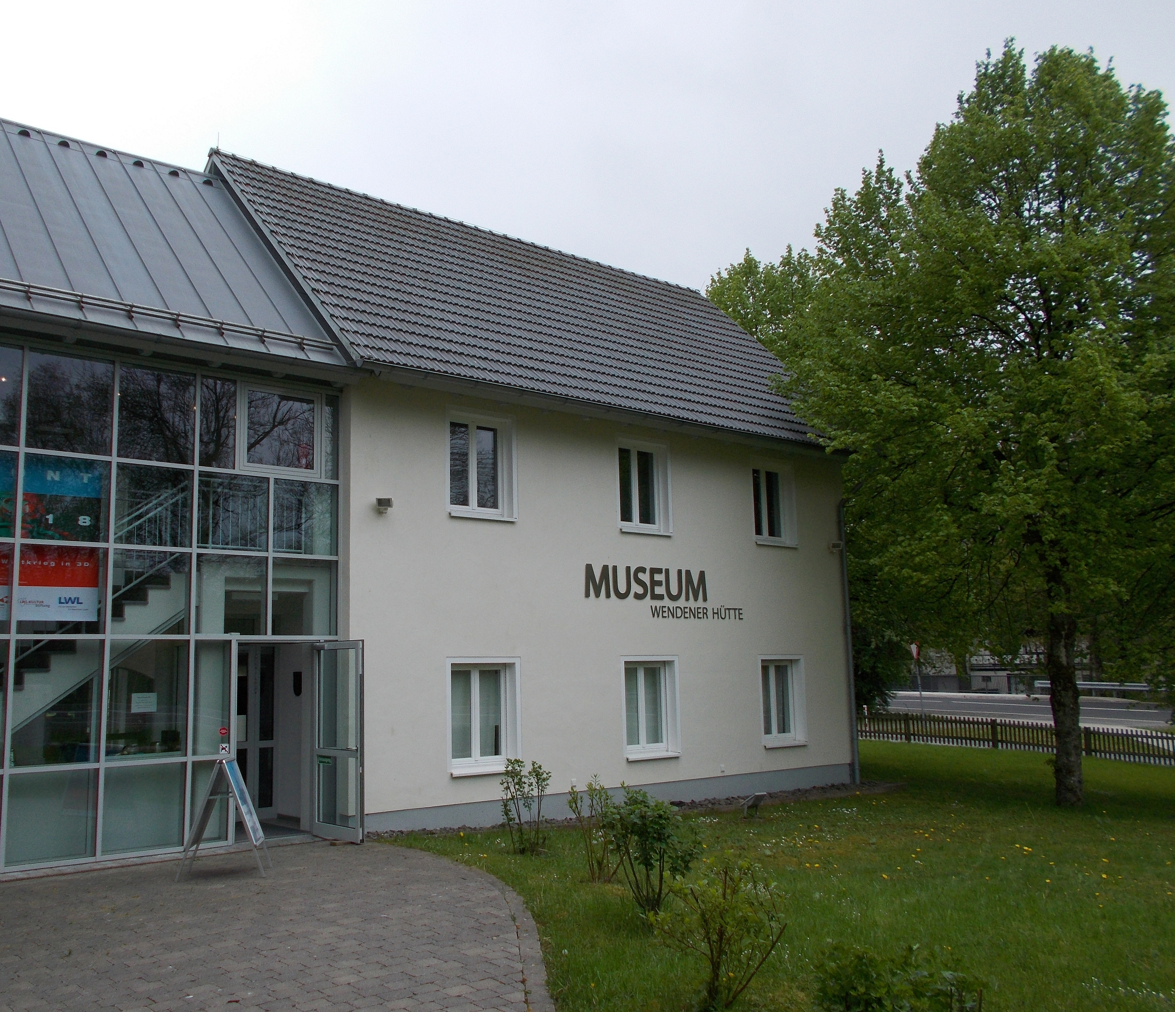 Museum Wendener Hütte, Wenden (Germany)